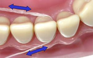 フロス使用例